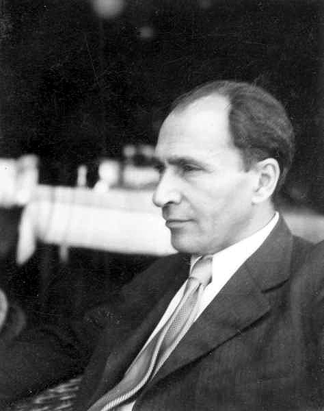 Déry Tibor író 1930 körül